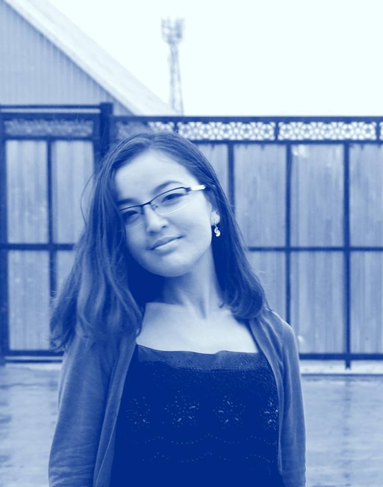 Монгол: м